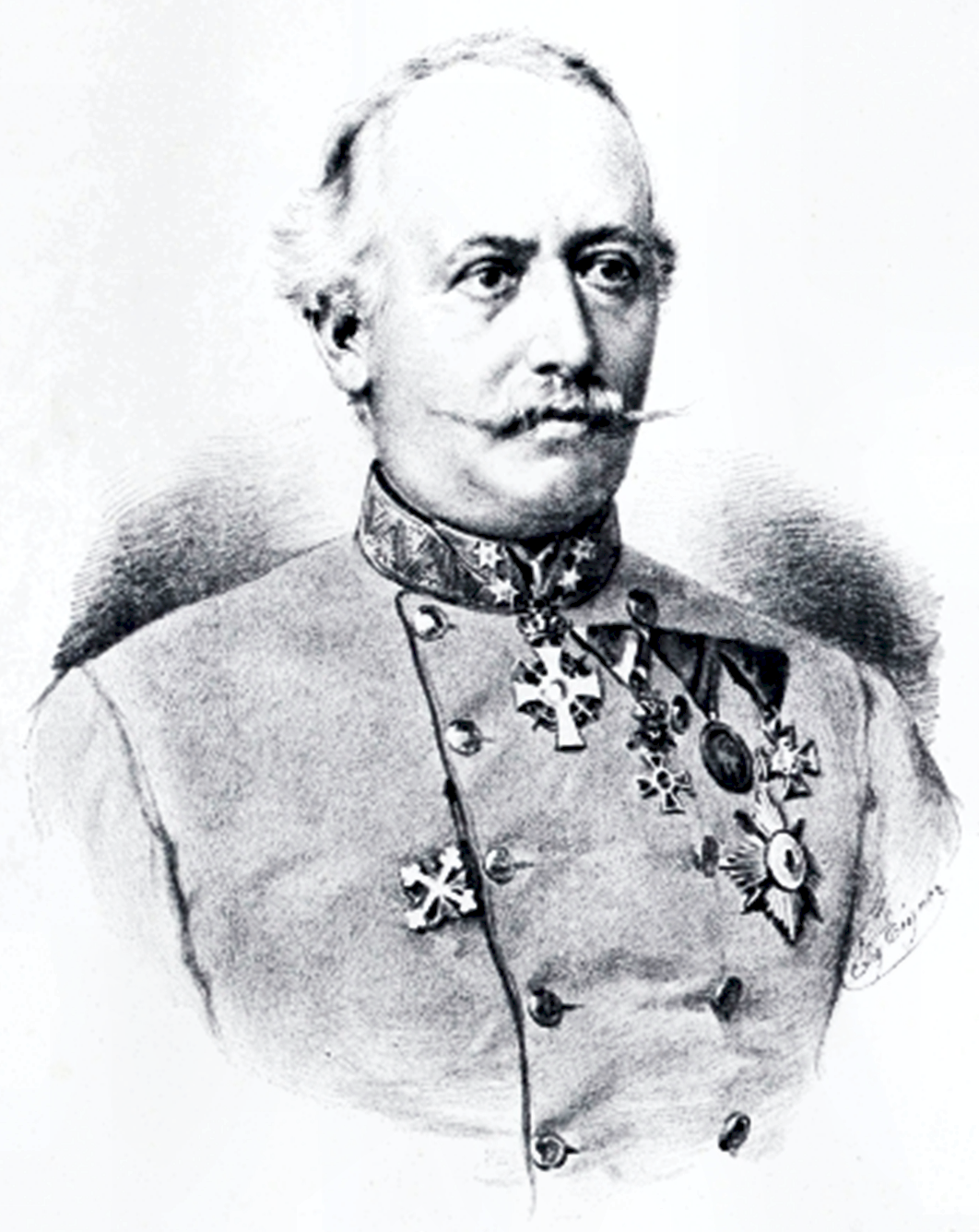 Vinzenz Pürcker von Pürkhain (1820–1901) als FML 1872 (Lithographie von Vinzenz Katzler (1823–1882).